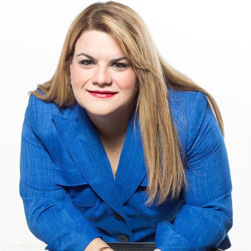 Comisionada residente de Puerto Rico